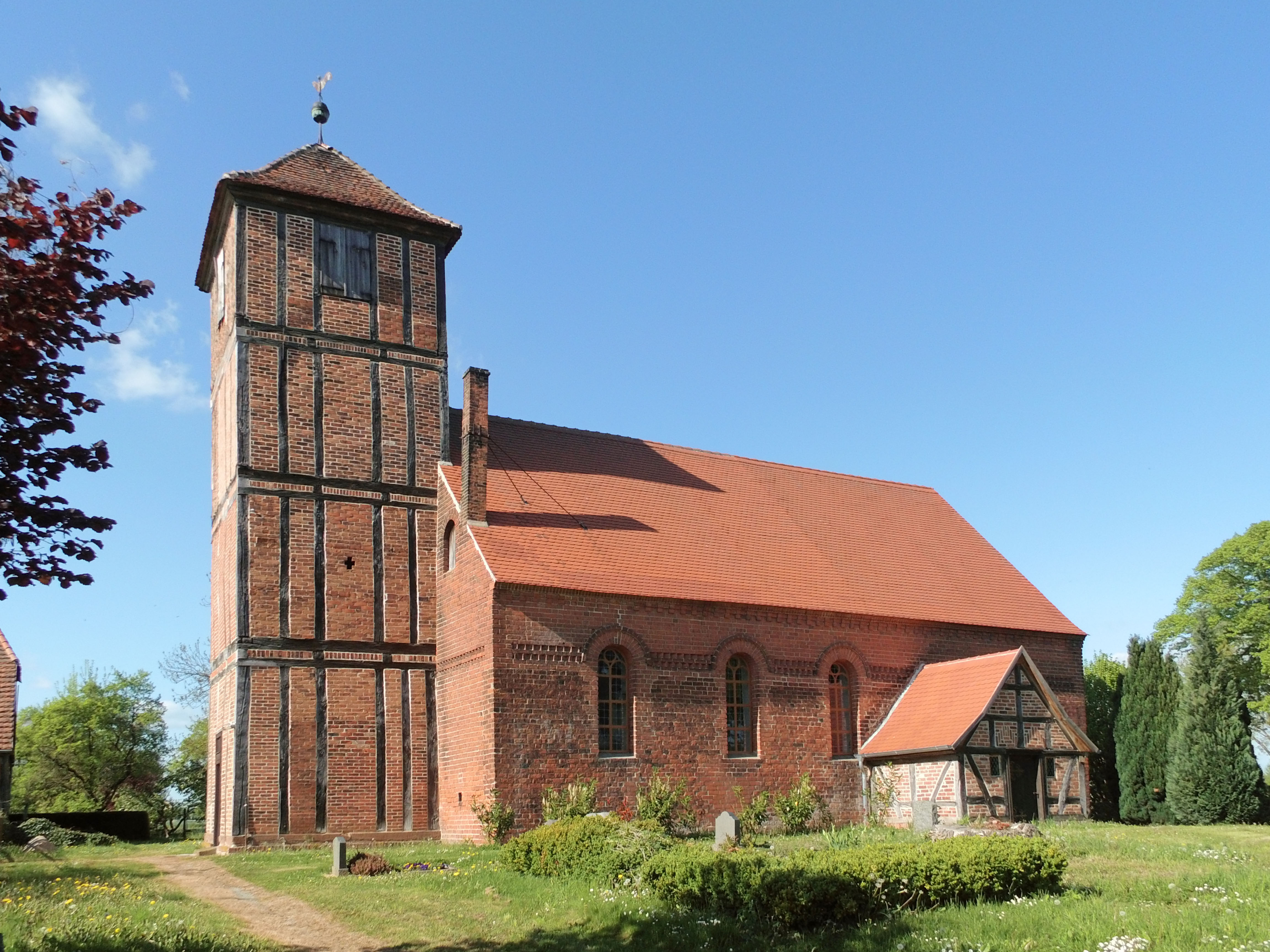 Evangelische Kirche in Wendemark (Landkreis Stendal).